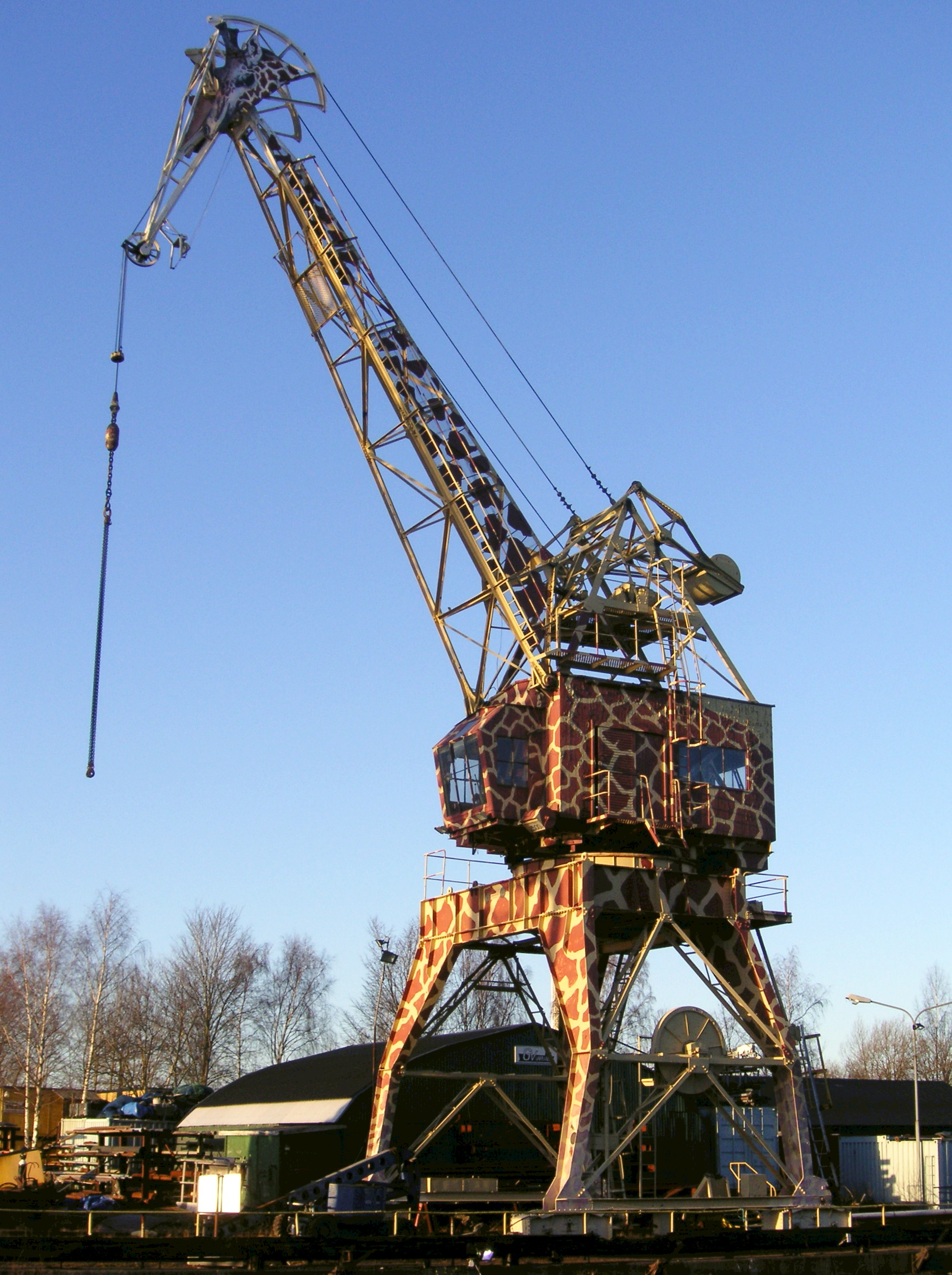 Giraffkranen på Beckholmen i Stockholm